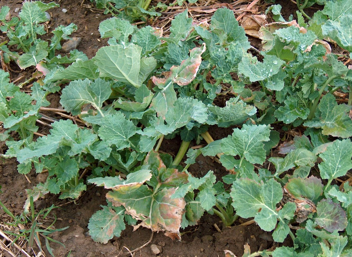 Raps im Frühjahr